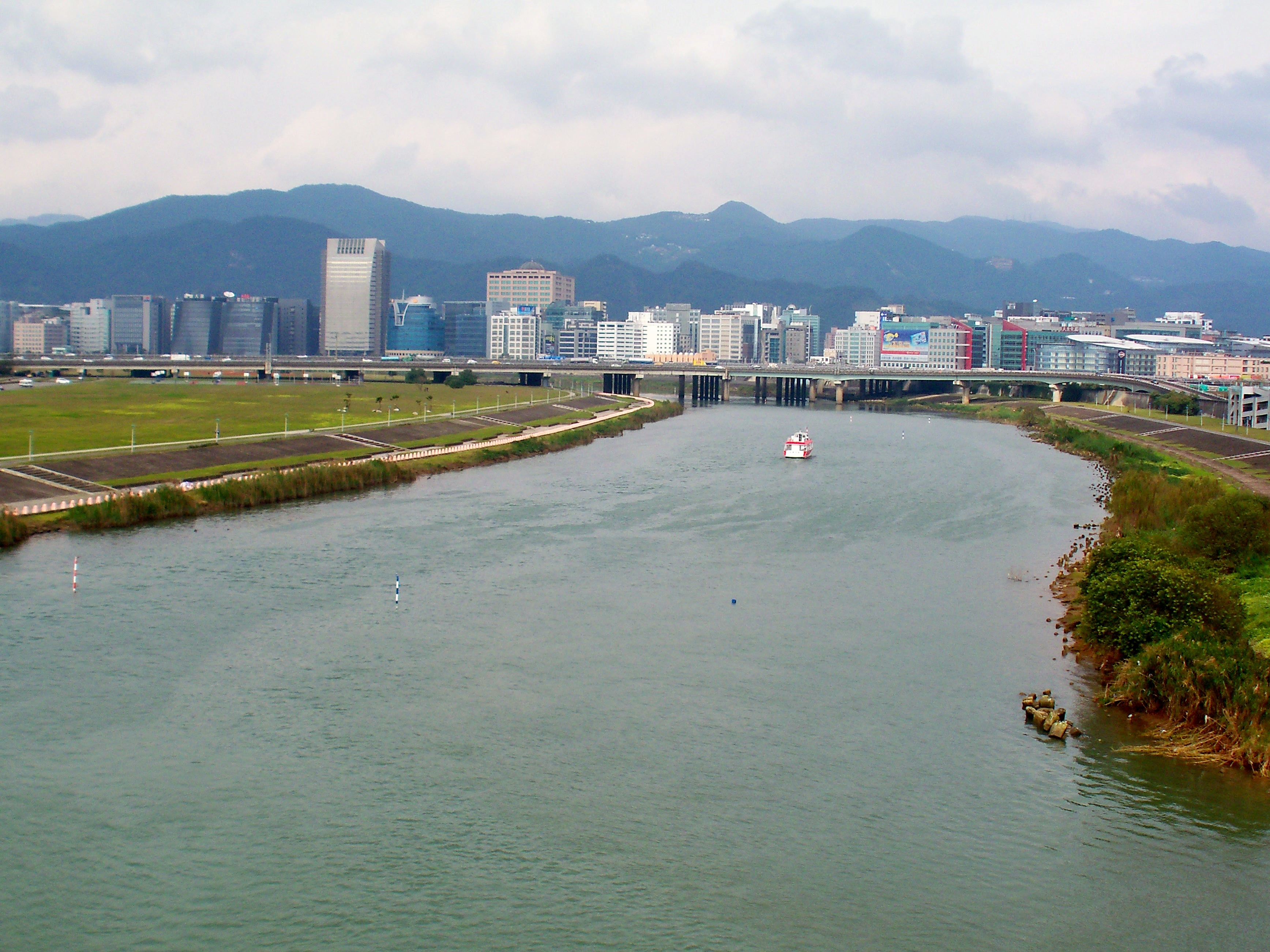 中文（台灣）: 自臺北市松山區民權大橋北望基隆河與中山高速公路，遠方為內湖區，行駛錫口～大佳間的花博5號遊艇順流而下。